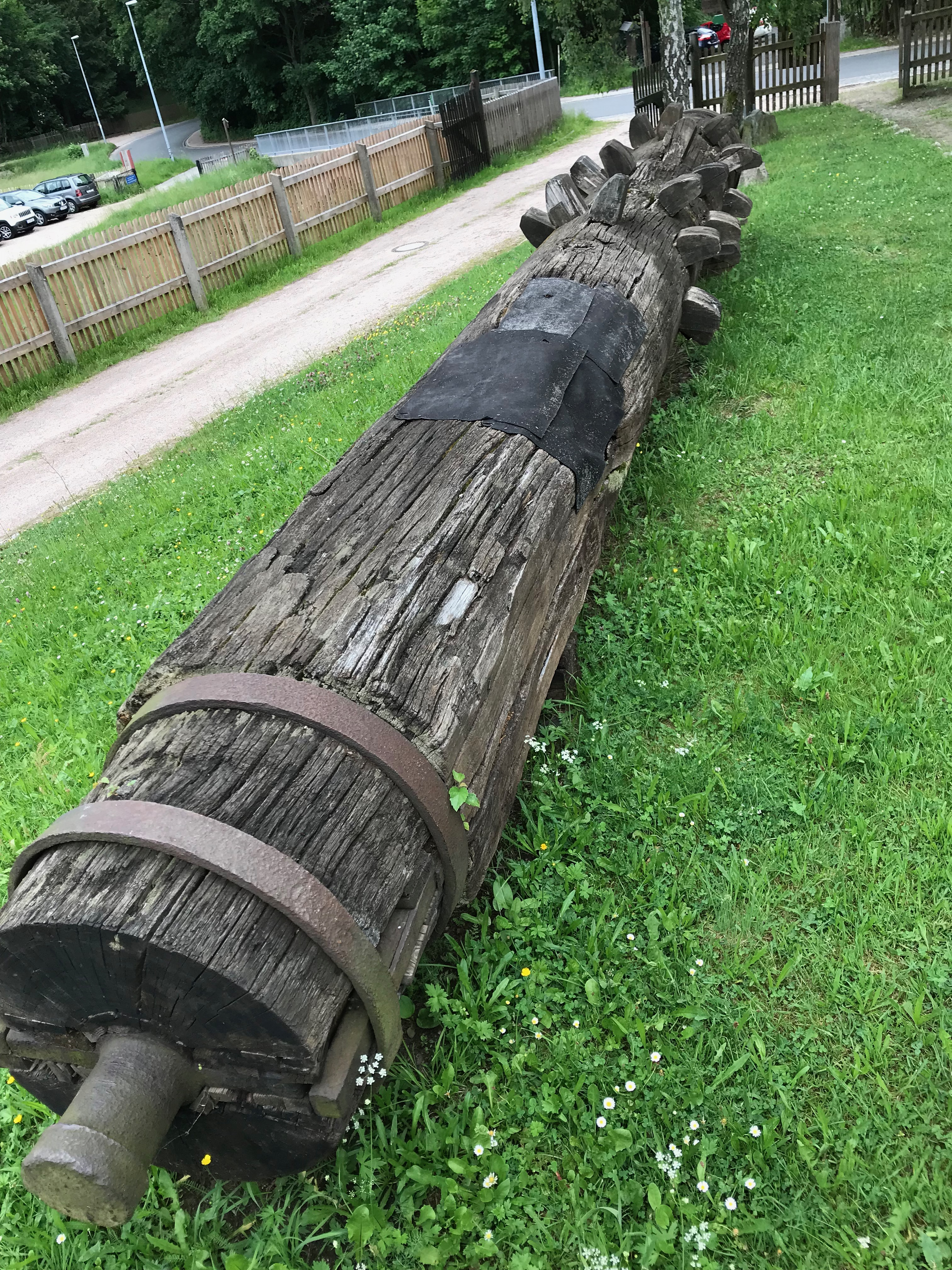 Pochwelle des in den 1960iger Jahren abgerissenen Danieler Pochwerkes (2018)